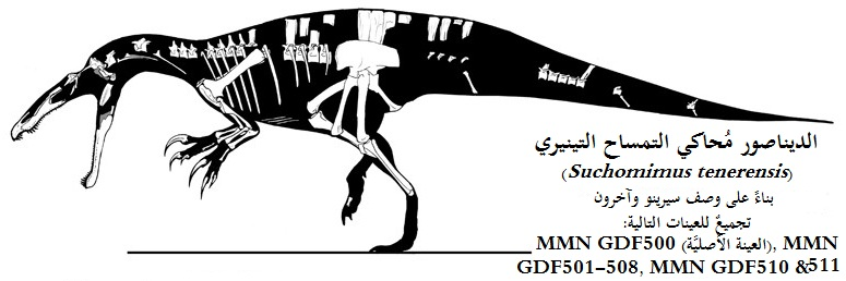 رسمٌ لِهيكلٍ عظميٍّ مُرممٍ لِلديناصور مُحاكي التمساح التينيري (Suchomimus tenerensis).